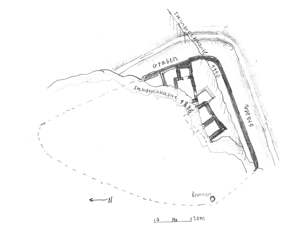 Heidenburg bei Oberstaufenbach, Grundriss-Skizze (selbst gezeichnet)